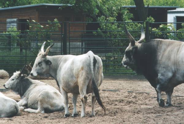 Tierpark Berlin - Ungarisches Steppenrind